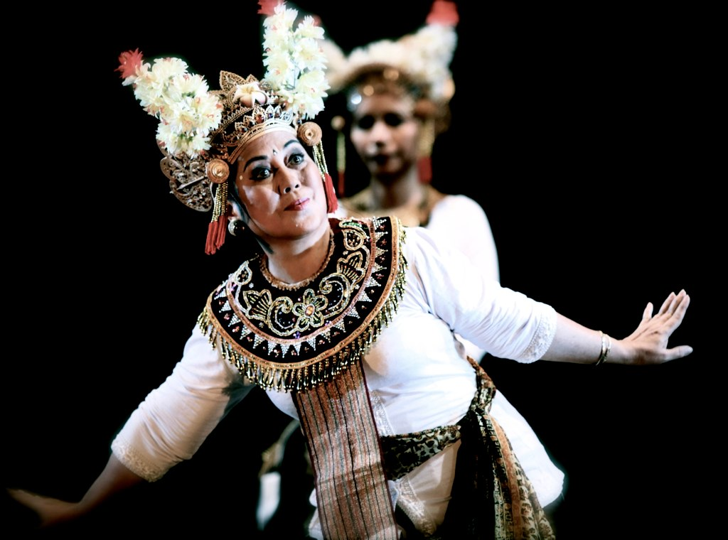 Te gast is Ayu Bulan Trisna Djelantik. Samen met haar zus Ayu Madelief Djelantik-Hobohm en nicht Ayu Kusuma Arini danst zij de beroemde Legong Garuda, ‘de dans van de vogel’. Alle drie zijn zij kleindochter van de laatste vorst van Karangasem, Oost Bali. Te gast op de 55e Tong Tong Fair in Den Haag, 22 mei t/m 2 juni 2013.